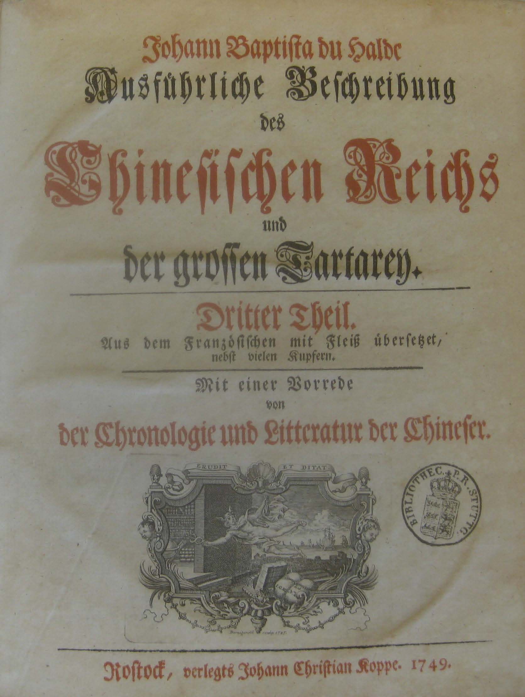 Titelblatt von: Johann Baptista du Halde: Ausführliche Beschreibung des Chinesischen Reiches und der großen Tartarey. Aus dem Französischen mit Fleiß übersetzet, nebst vielen Kupfern. Mit einer Vorrede von der Chronologie und Litteratur der Chineser', Band 3, Rostock : Koppe, 1749. – Der Band enthält auf den Seiten 372-418 vier Novellen aus dem Jingu Qiguan.